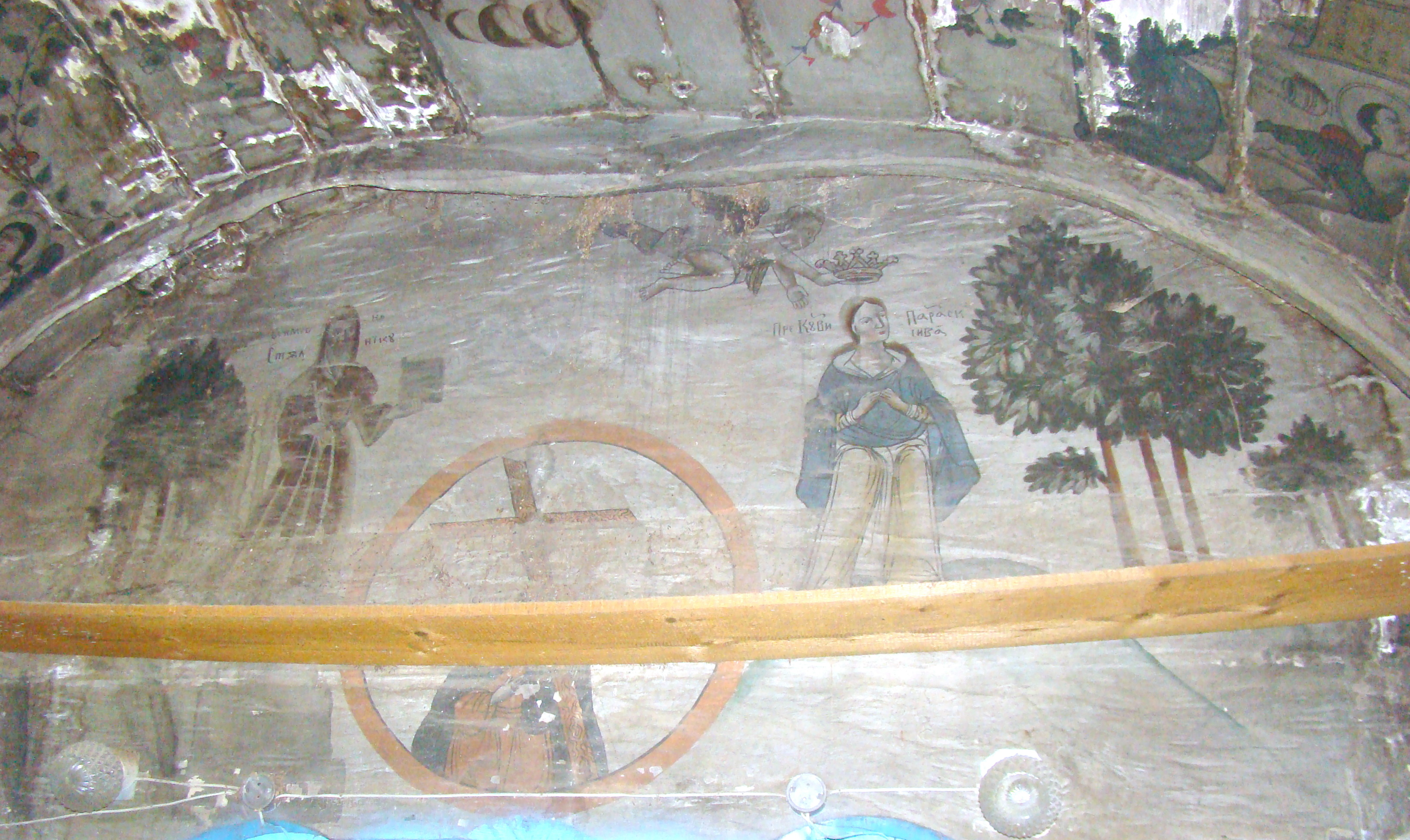 Biserica de lemn “Învierea Domnului” din Cubleșu, județul Sălaj